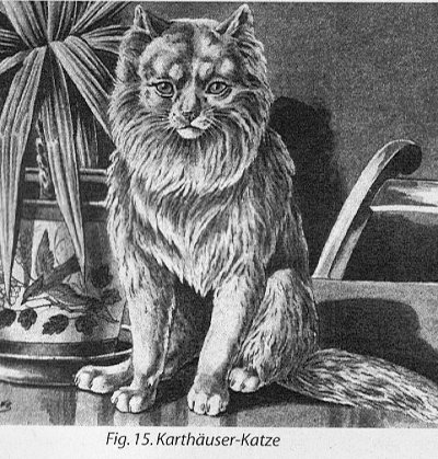 Rassebeschreibung, Zucht, Pflege, Fütterung und Krankheiten der katze